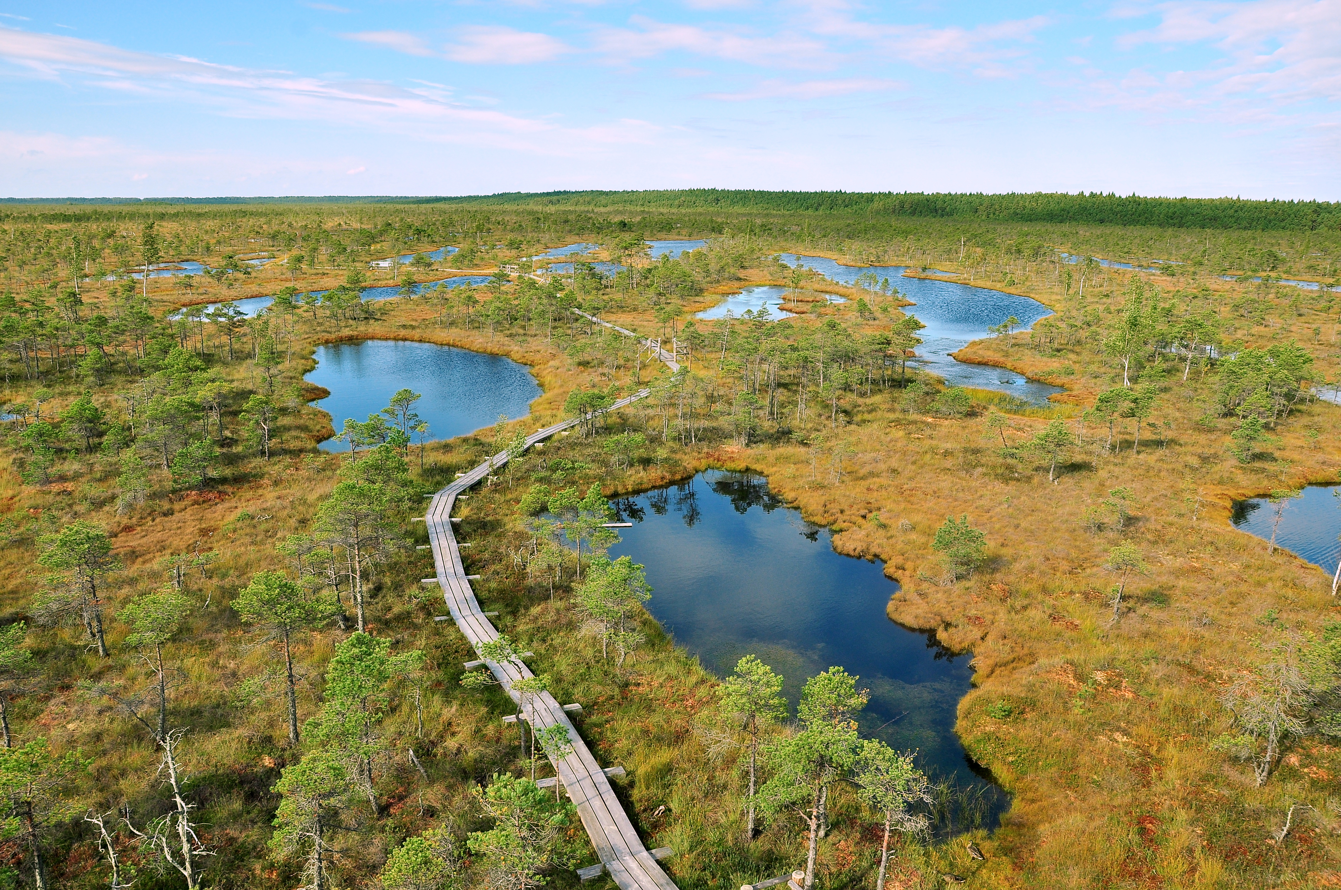 Purvs